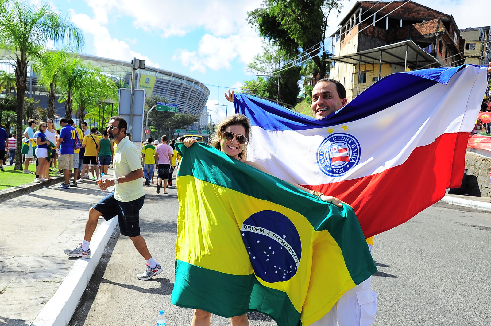 Manifestações de junho de 2013 em Salvador, Bahia, Brasil.